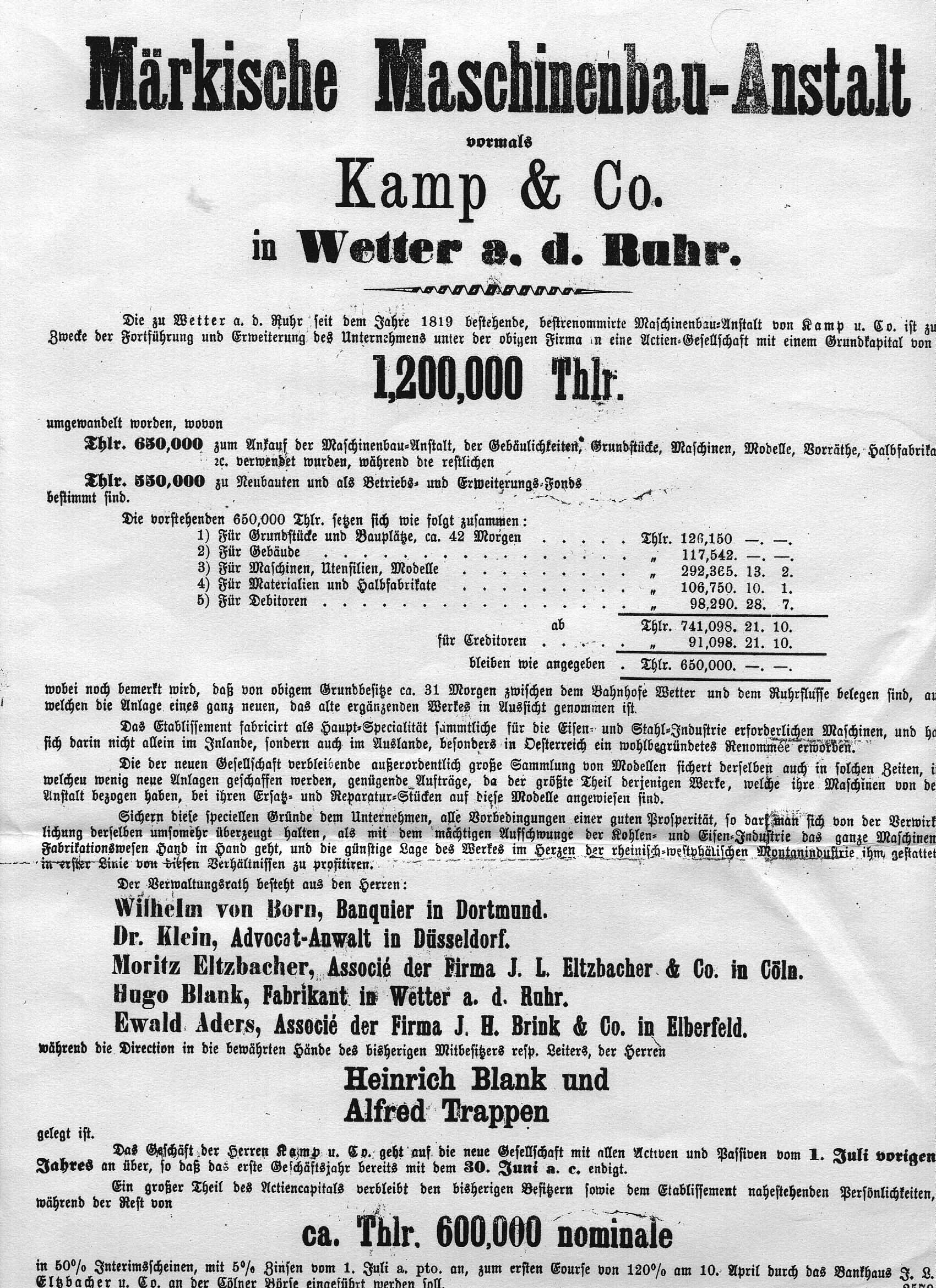 Zeitungsanzeige/Bekanntmachung der Umwandlung in eine Aktiengesellschaft der Märkischen Maschinenbau-Anstalt (vormals Kamp & Co.) in Wetter a. d. Ruhr in den 1870er Jahren (zur Geschichte siehe Mechanische Werkstätten Harkort & Co.)